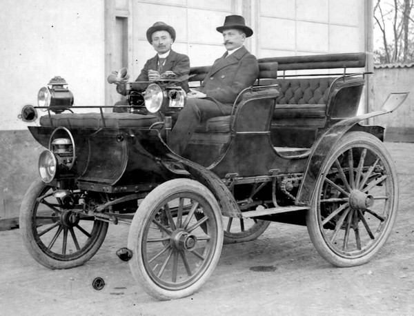 Véhicule Audibert et Lavirotte : modèle double phaéton 1897.